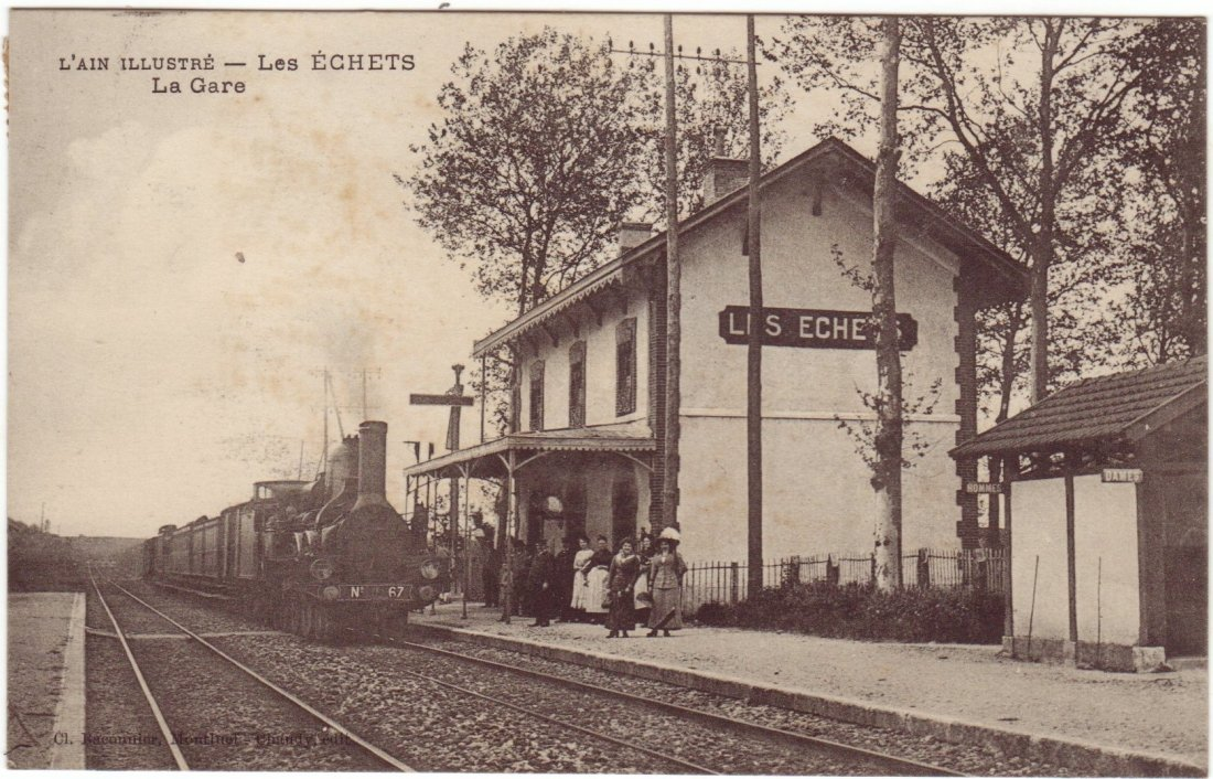 Carte postale ancienne du hameau des Échets, Miribel, France.